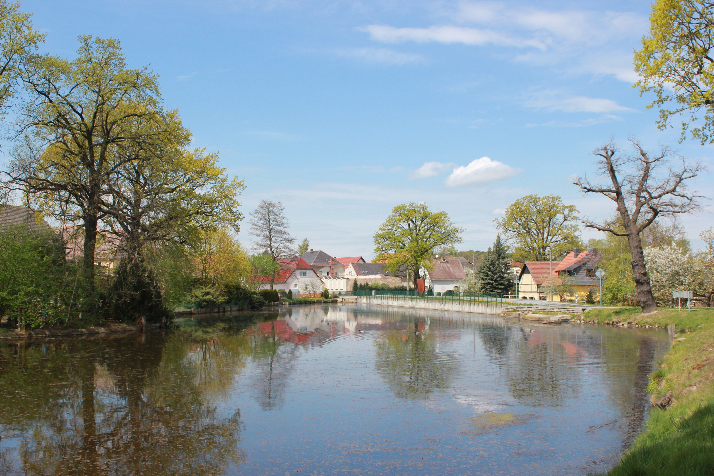 Hornjoserbsce: Wjesny hat w Jaseńcy.